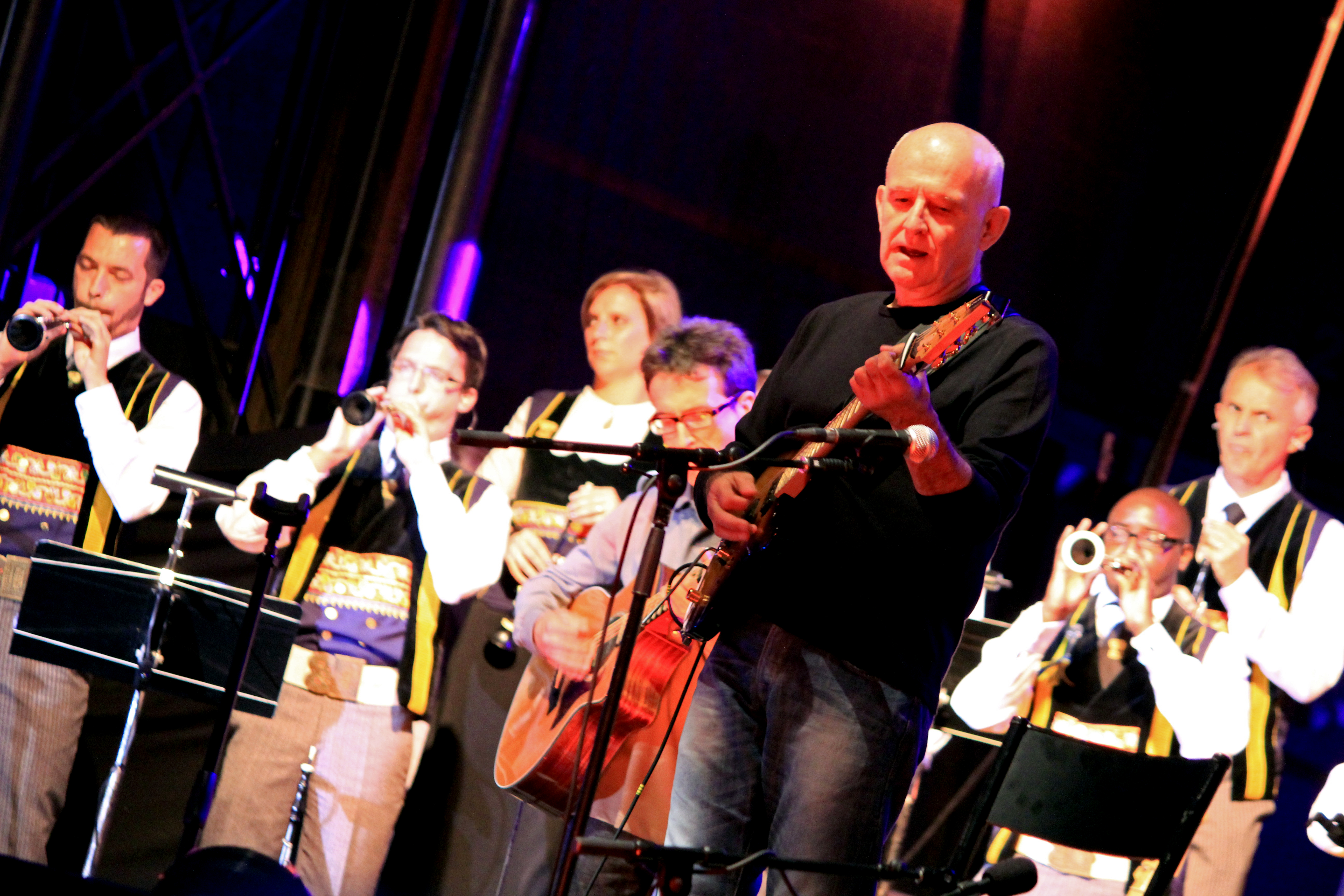 Dan Ar Braz et le Bagad Kemper lors du concert inaugural de la tournée liée à la promotion de l'album Celebration, lors du Festival Interceltique de Lorient 2012.